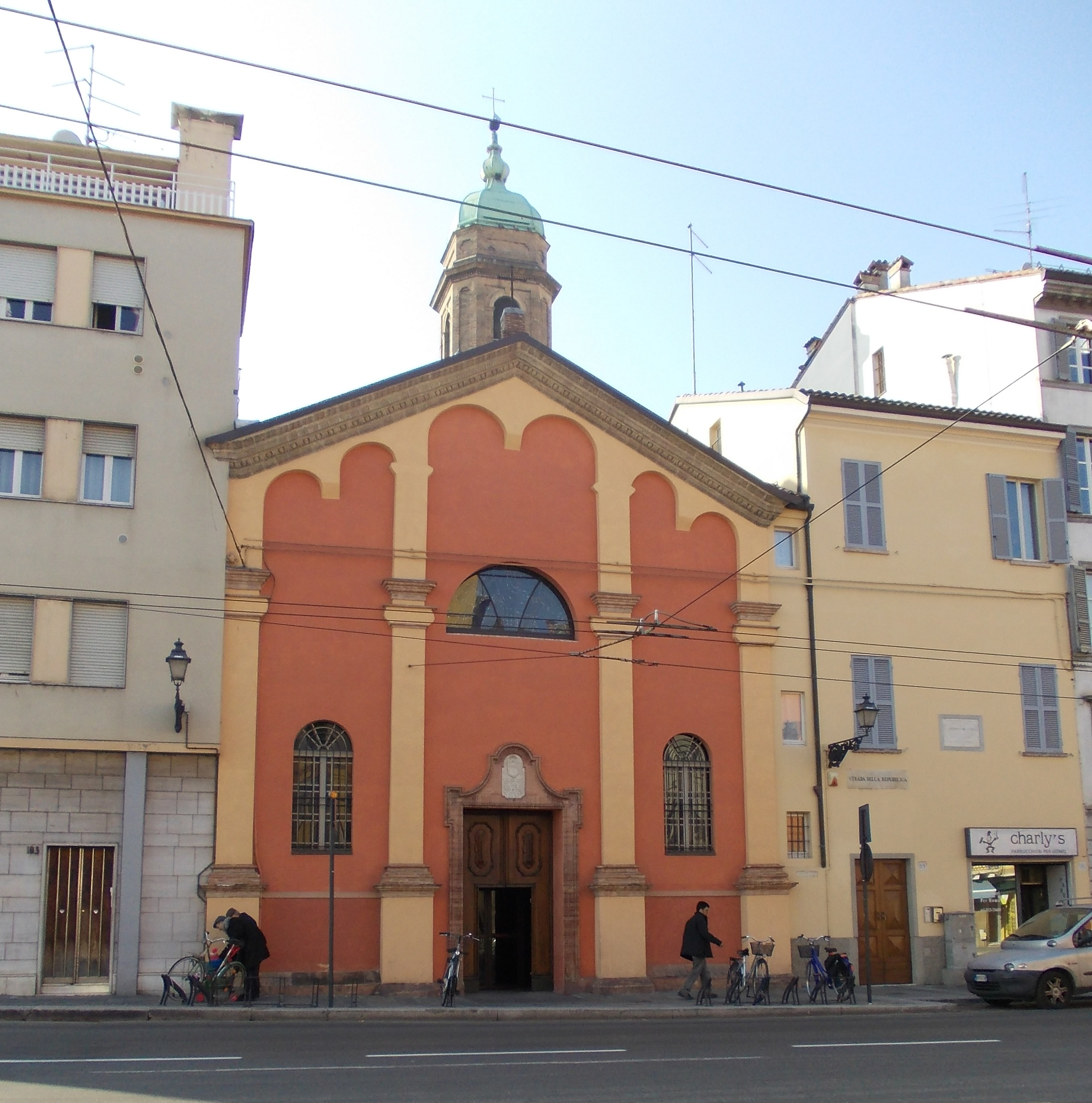 La facciata della chiesa parrocchiale di San Michele, Parma